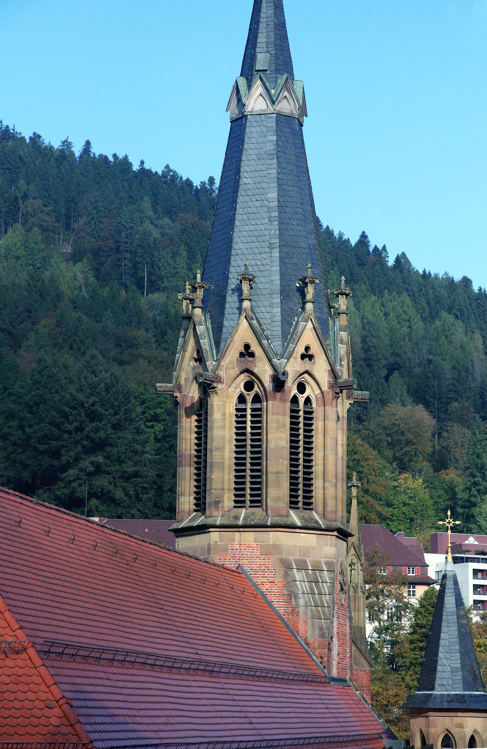 Römisch-katholische Pfarrkirche St. Bonifatius Bad Wildbad